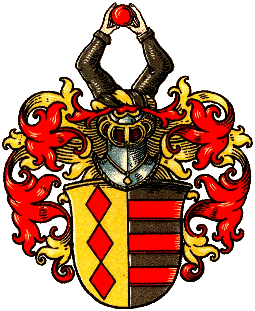 Wappen der Herren von Lürwald